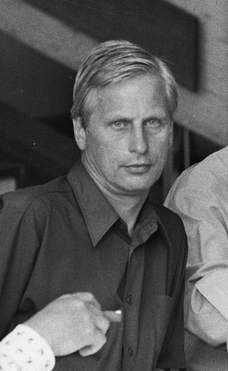 Richard Schoonhoven aanwezig bij de vergadering over de benoeming van Erik Jurgens tot NOS-voorzitter.